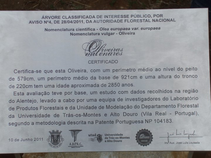 Oliveira com 2850 anos no Bairro da Covina em Santa Iria de Azóia, Portugal